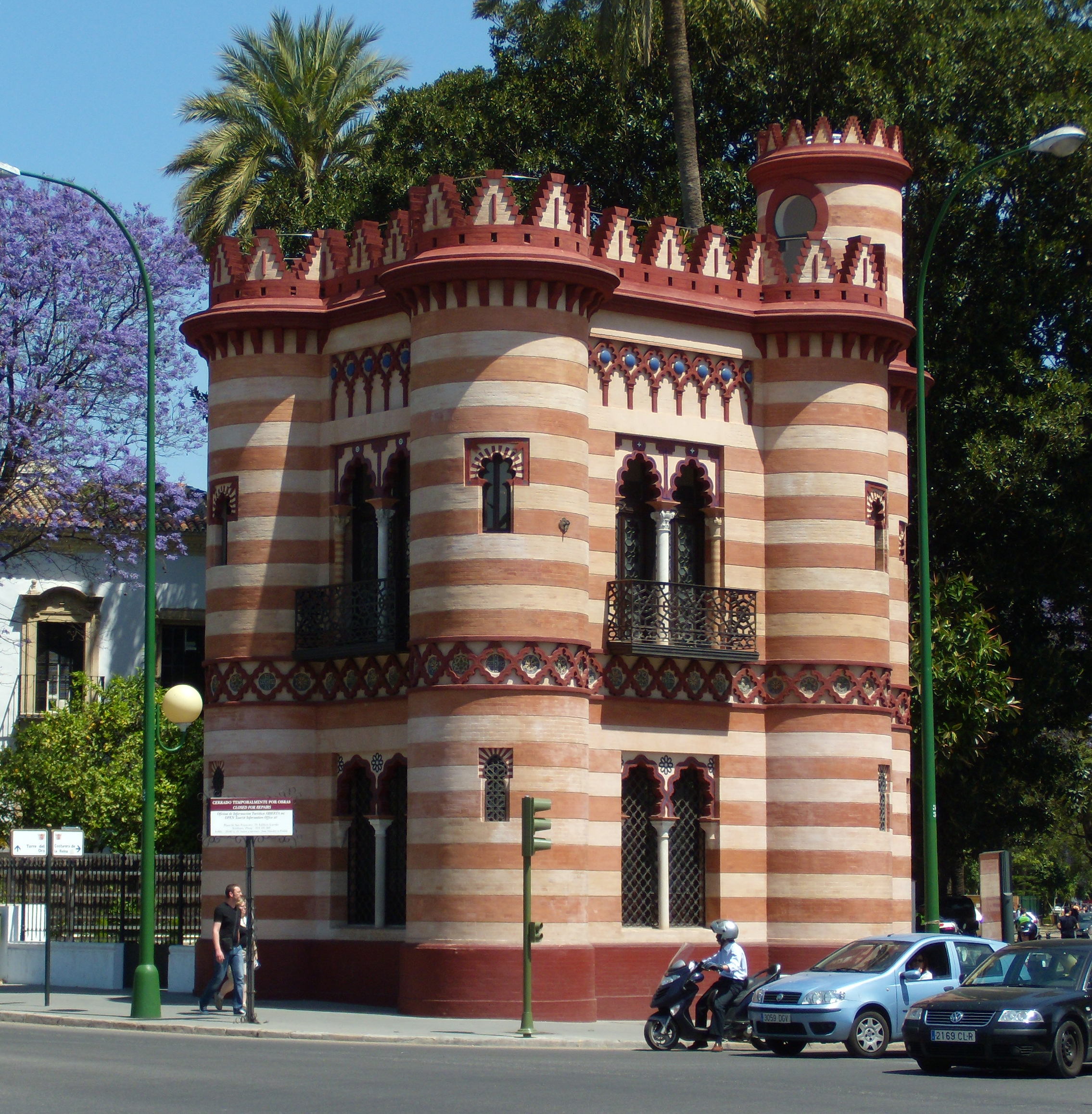 Le Costurero de la Reina, à Séville (Espagne)